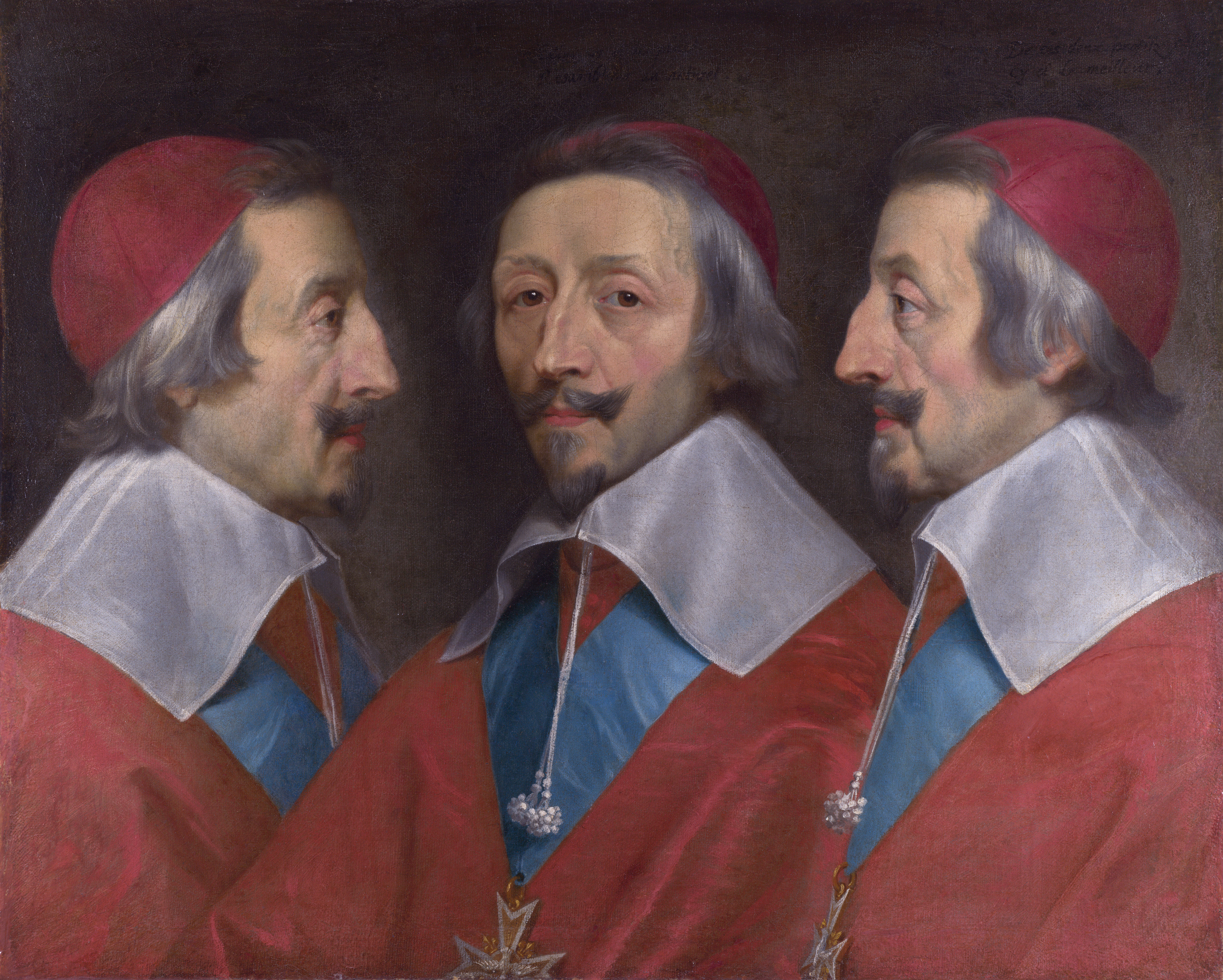 Hier wird das Gesicht des Kardinals von allen Seiten auf einem Bild dargestellt.